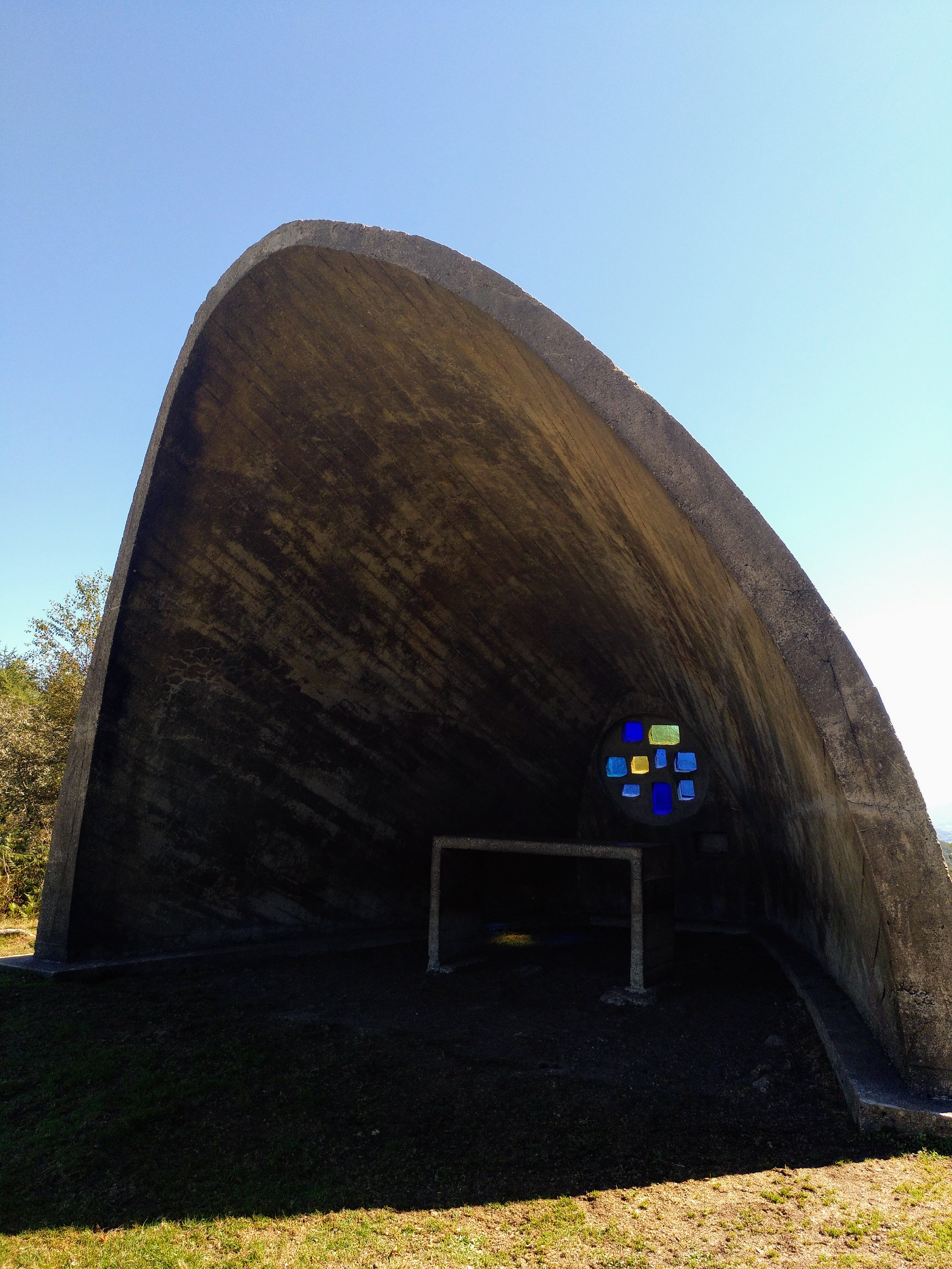 Luis Vallet arkitektoaren kapera Agina gainean